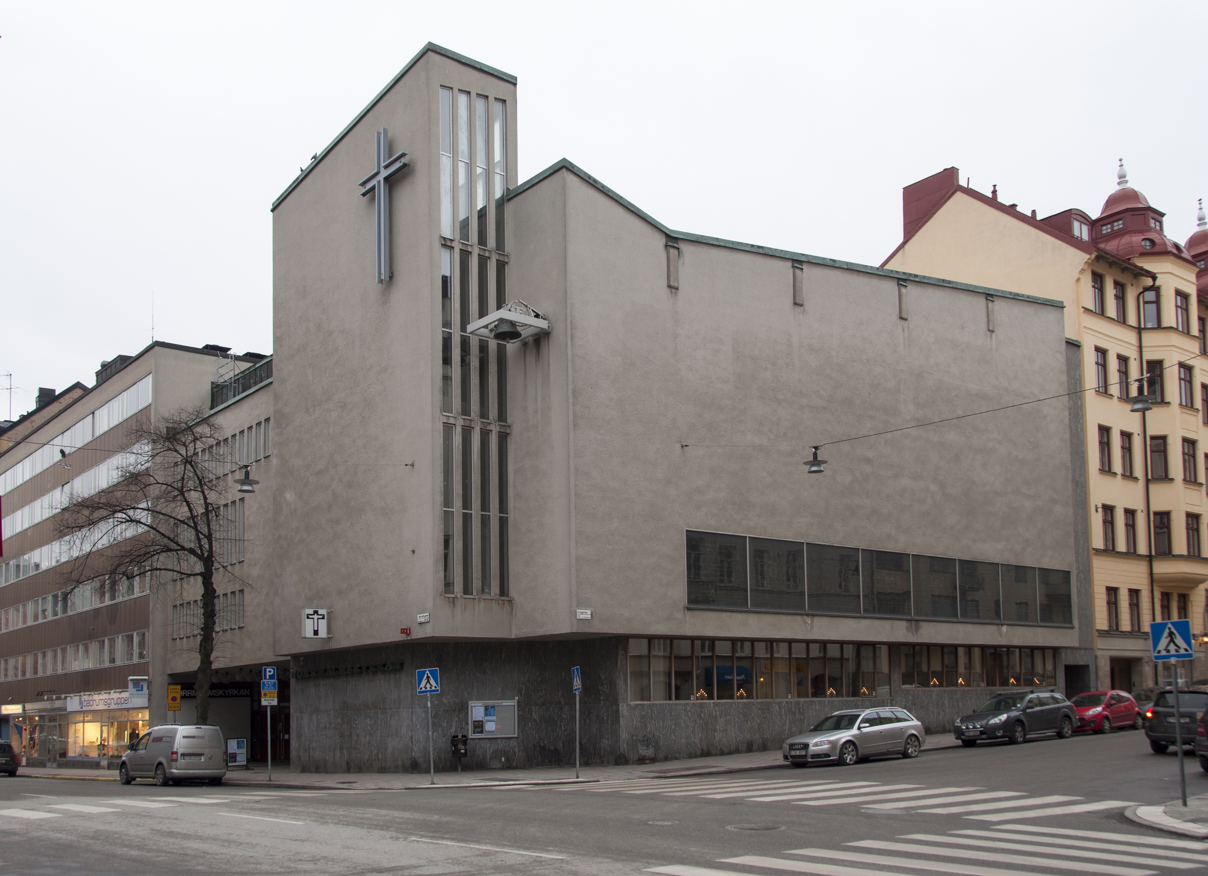 Norrmalmskyrkan, Norrtullsgatan 33, Norrtullsgatan 37, Nybyggnadsår 1962 - 1968, Bengt S. Carlberg - Stig Hermansson (Arkitekt) John Mattson Byggnads AB (Byggmästare) Sällskapet V.S gm Norrmalms Baptistförsamling (Byggherre)